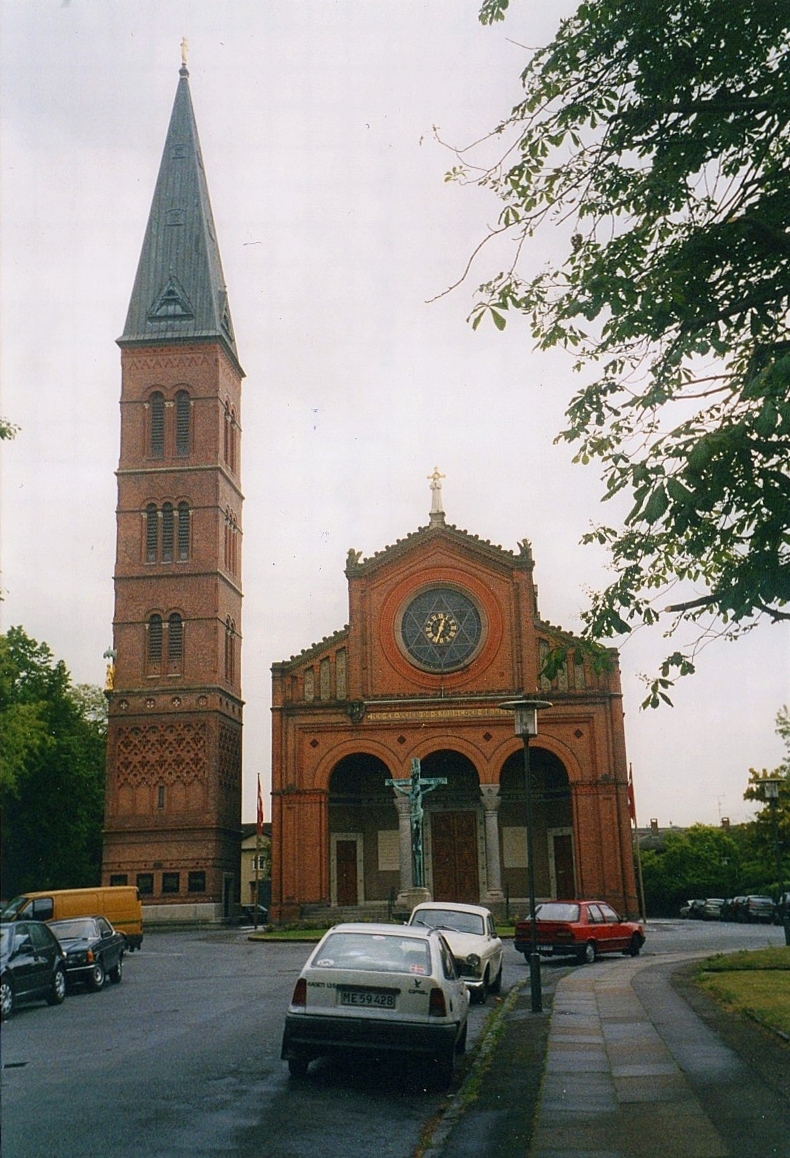 Jesuskirken, Valby Kommune